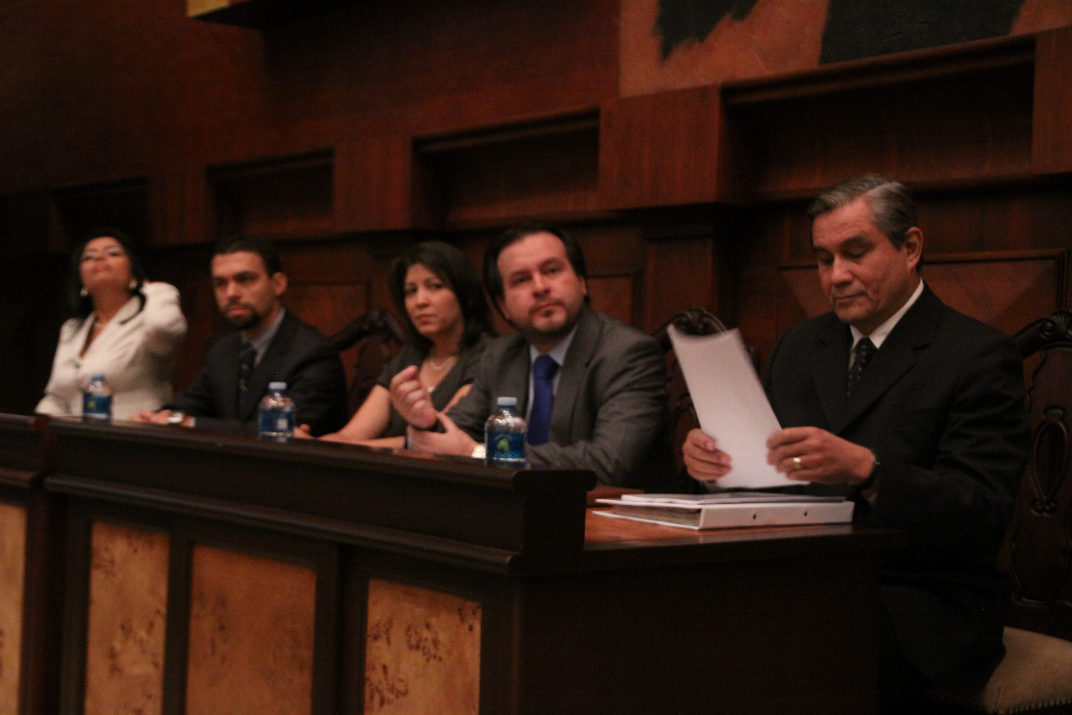 8 de Agosto de 2012